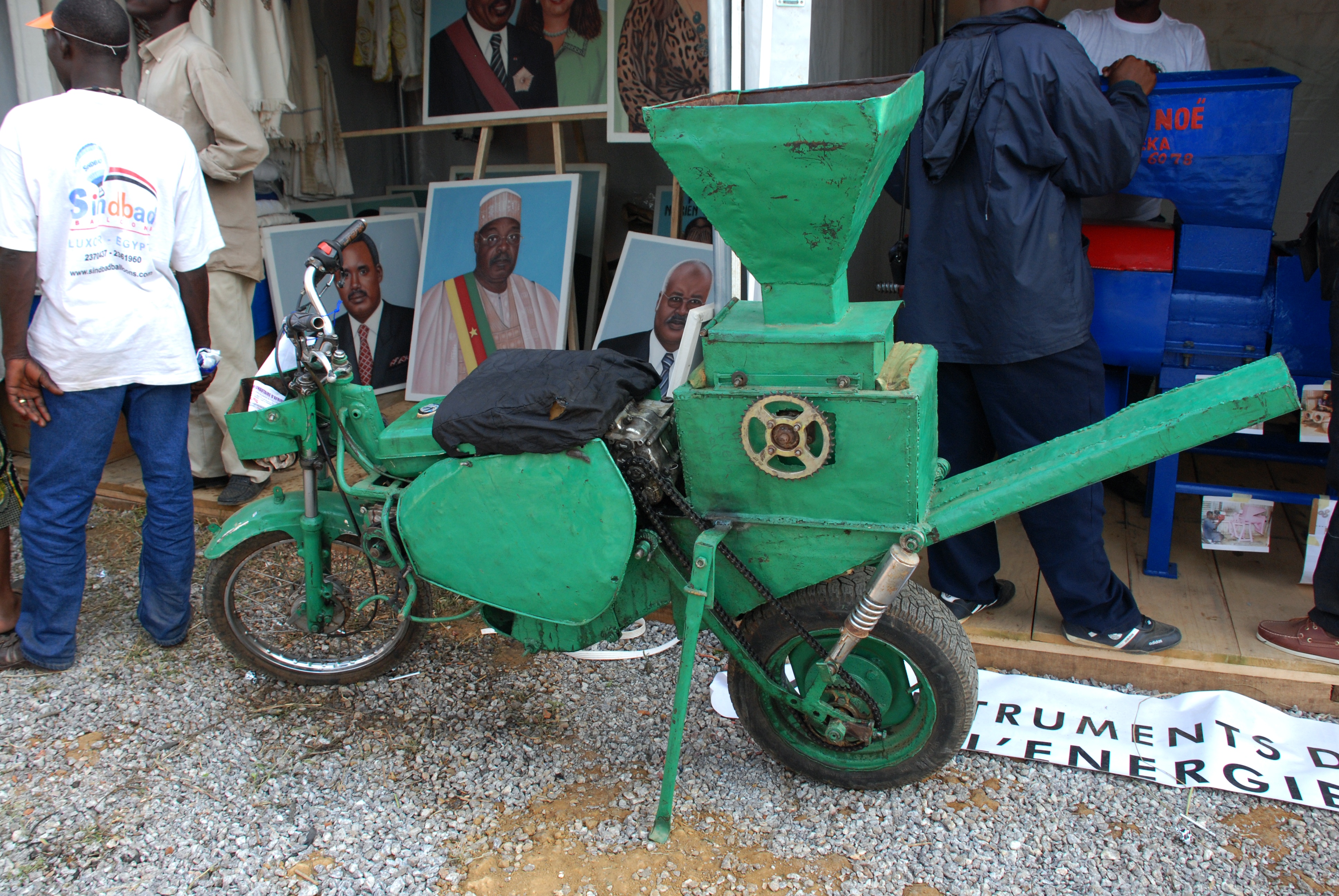 Une moto transformée en moulin pour desservir les populations dans des zones qui manque de courant électrique présenté pendant le comice agro pastoral d’Ebolowa au Cameroun. This is an image with the theme "Africa on the Move or Transport" from: Cameroon